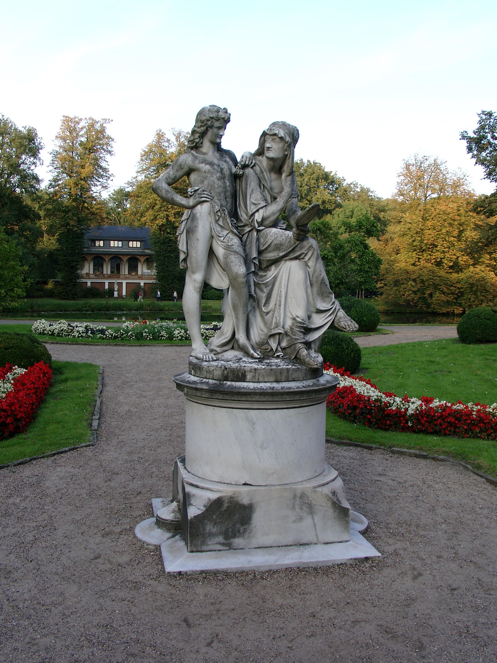 Sculpture "Jüngling und Schicksalsgöttin" by Constantin Dausch in the garden of the restaurant "Meierei" in the Bürgerpark, Bremen, Germany Das abgebildete Objekt ist ein geschütztes Kulturdenkmal in der Freien Hansestadt Bremen, mit der Nr. 0218,T030 beim Landesamt für Denkmalpflege registriert.